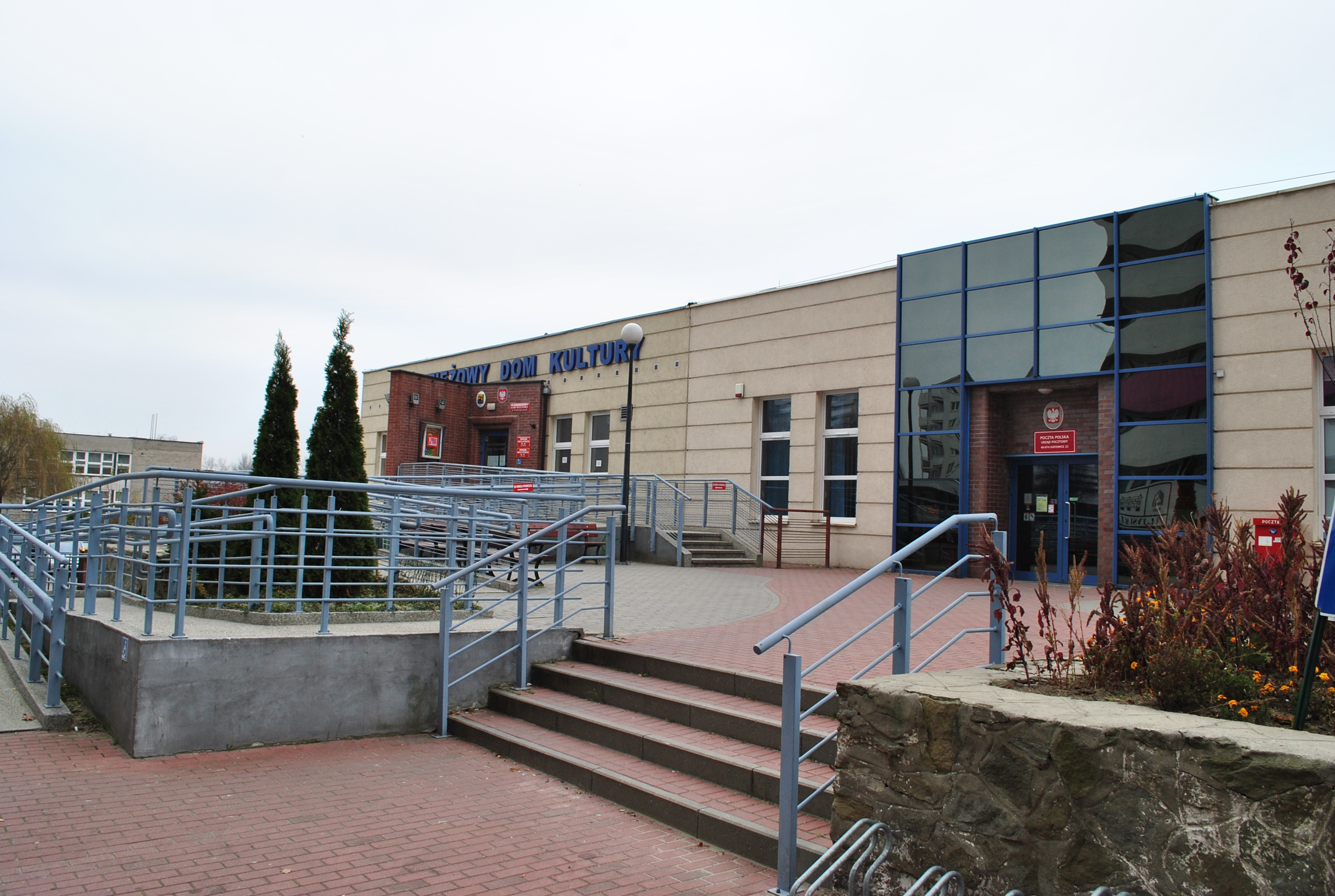 Katowice, Osiedle Tysiąclecia. Młodzieżowy Dom Kultury